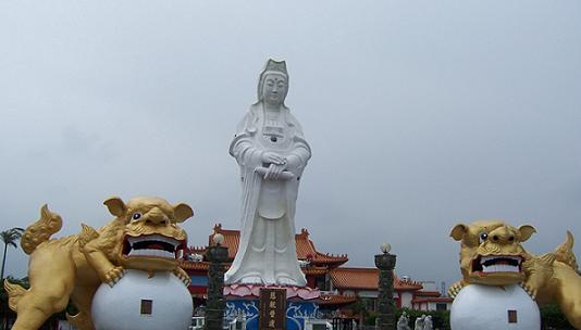 基隆市中正公園觀音像。